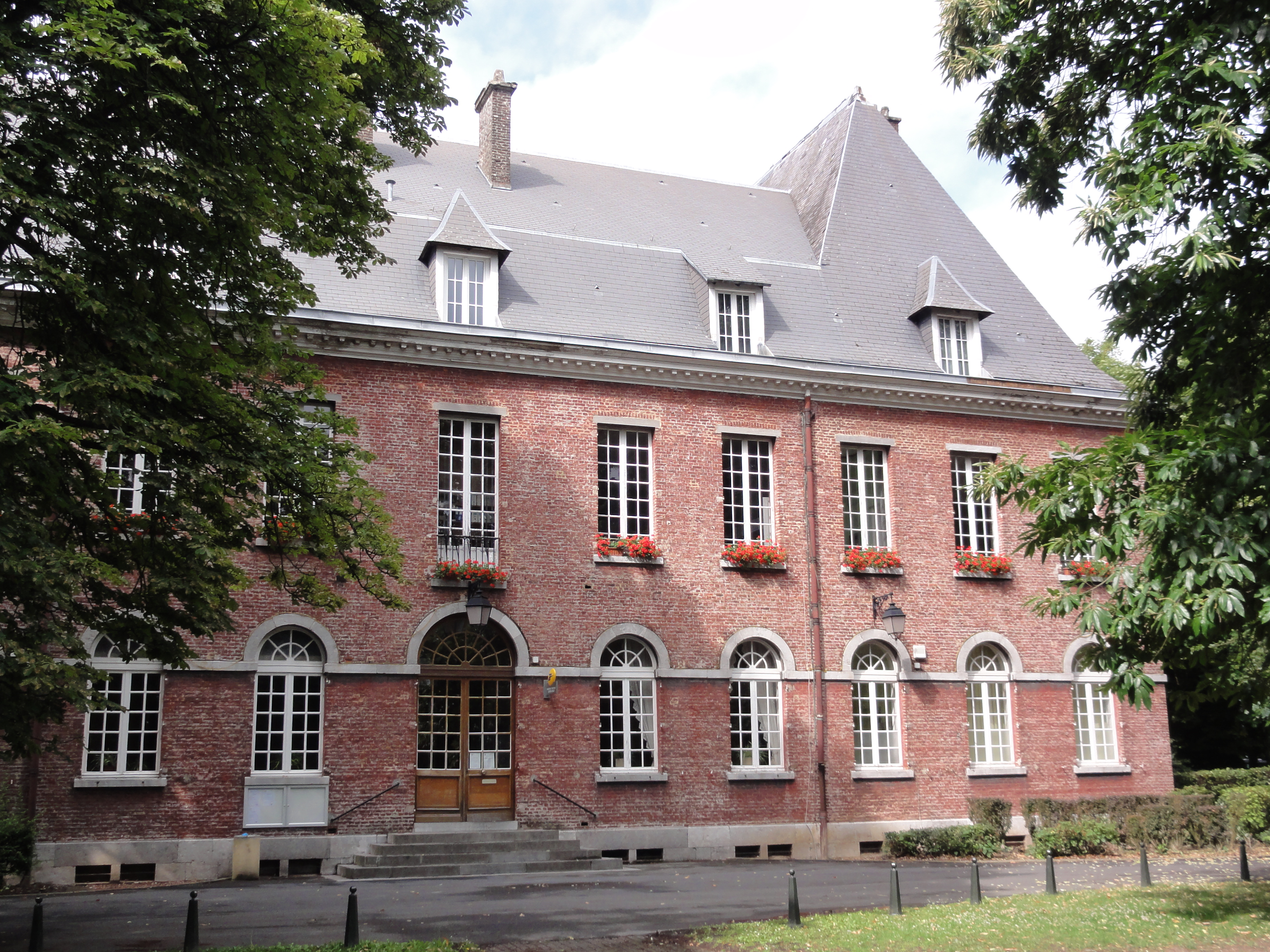 Recquignies (Nord, Fr) mairie.